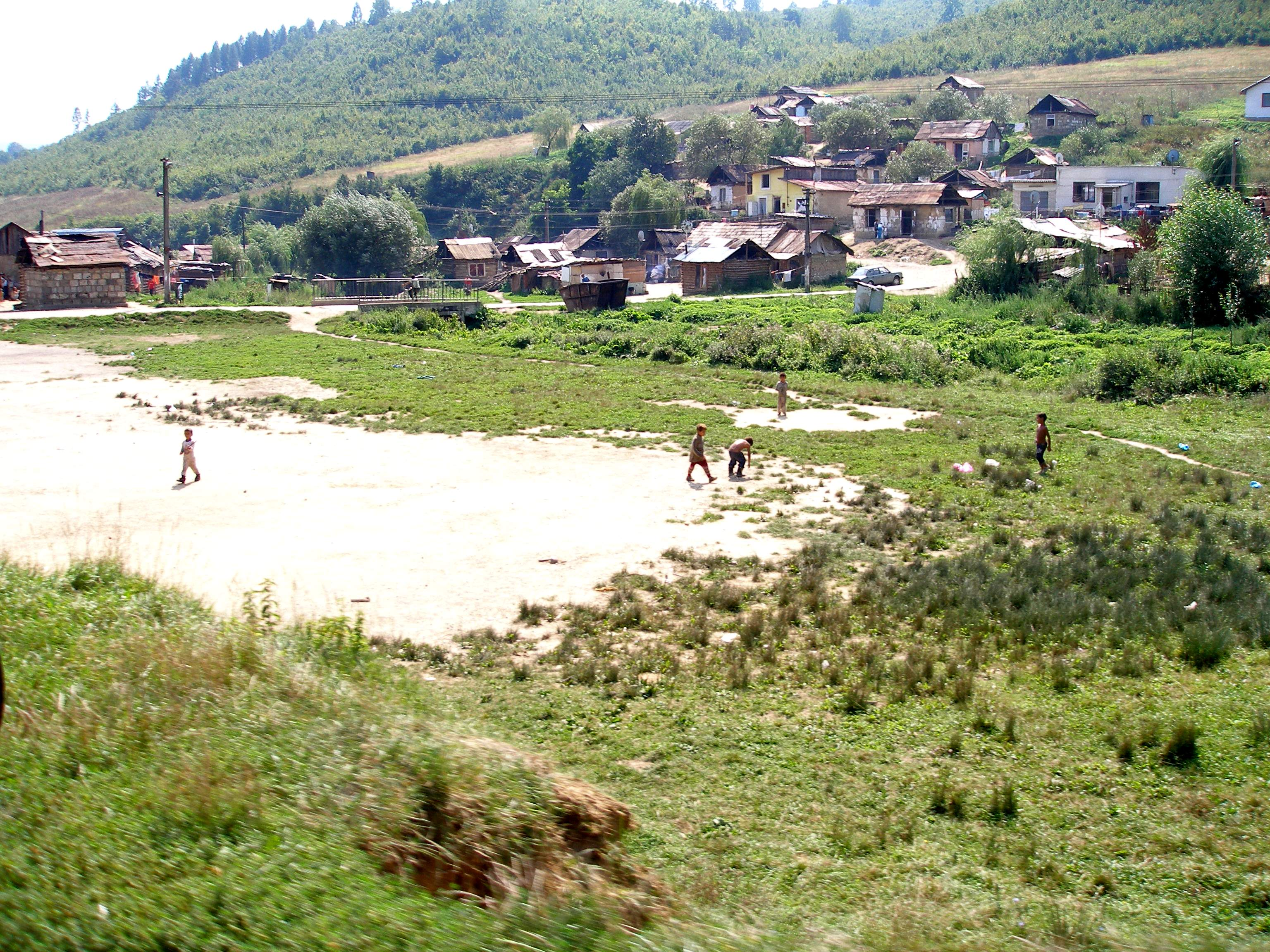 Rómska osada patriaca do katastra obce Chmiňany, okres Prešov región Šariš